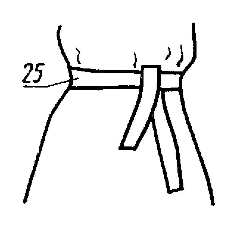 Изображение из ГОСТ 22977-89 (СТ СЭВ 6484-88) — Детали швейных изделий. Термины и определения.